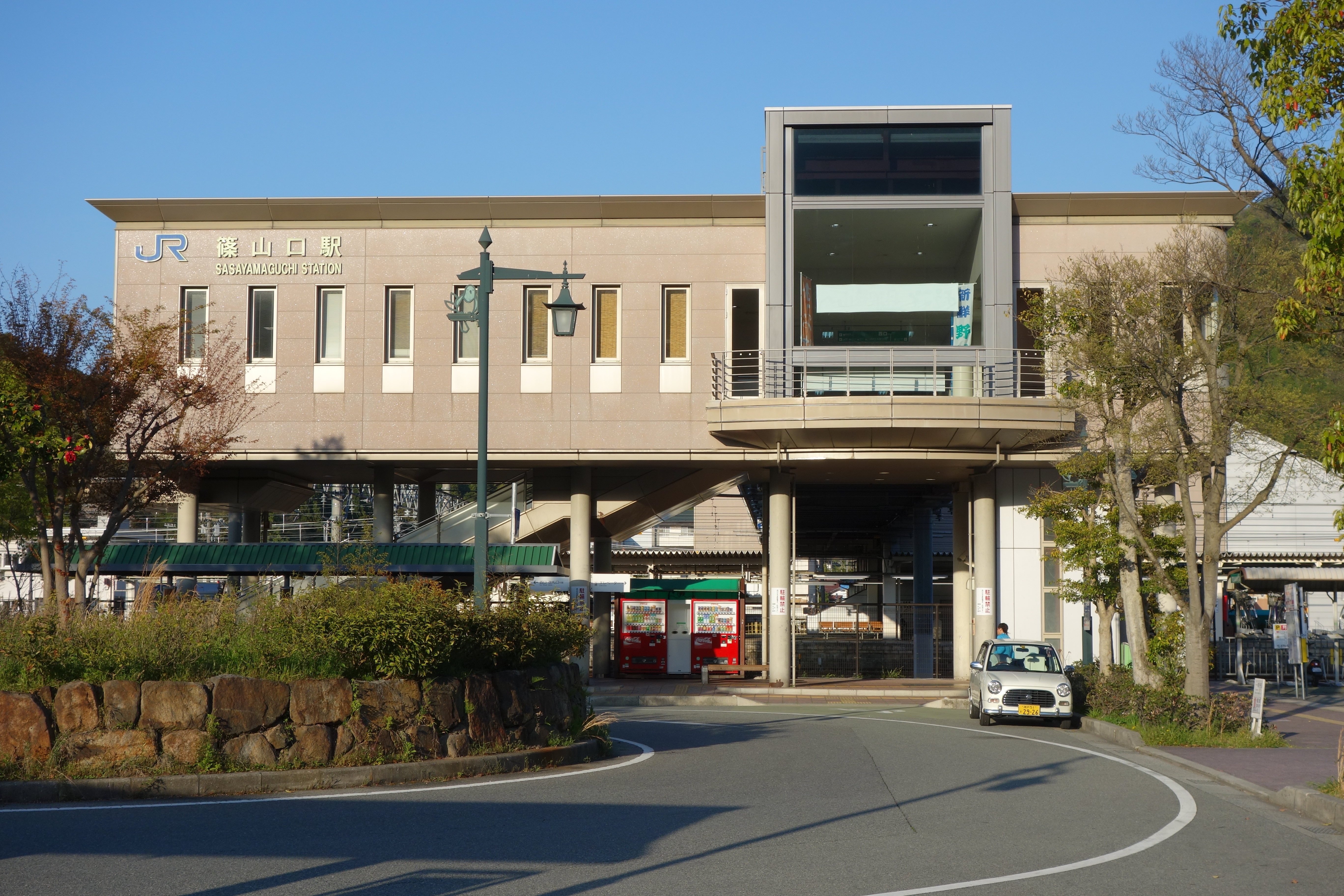 篠山口駅（西口・2013年）